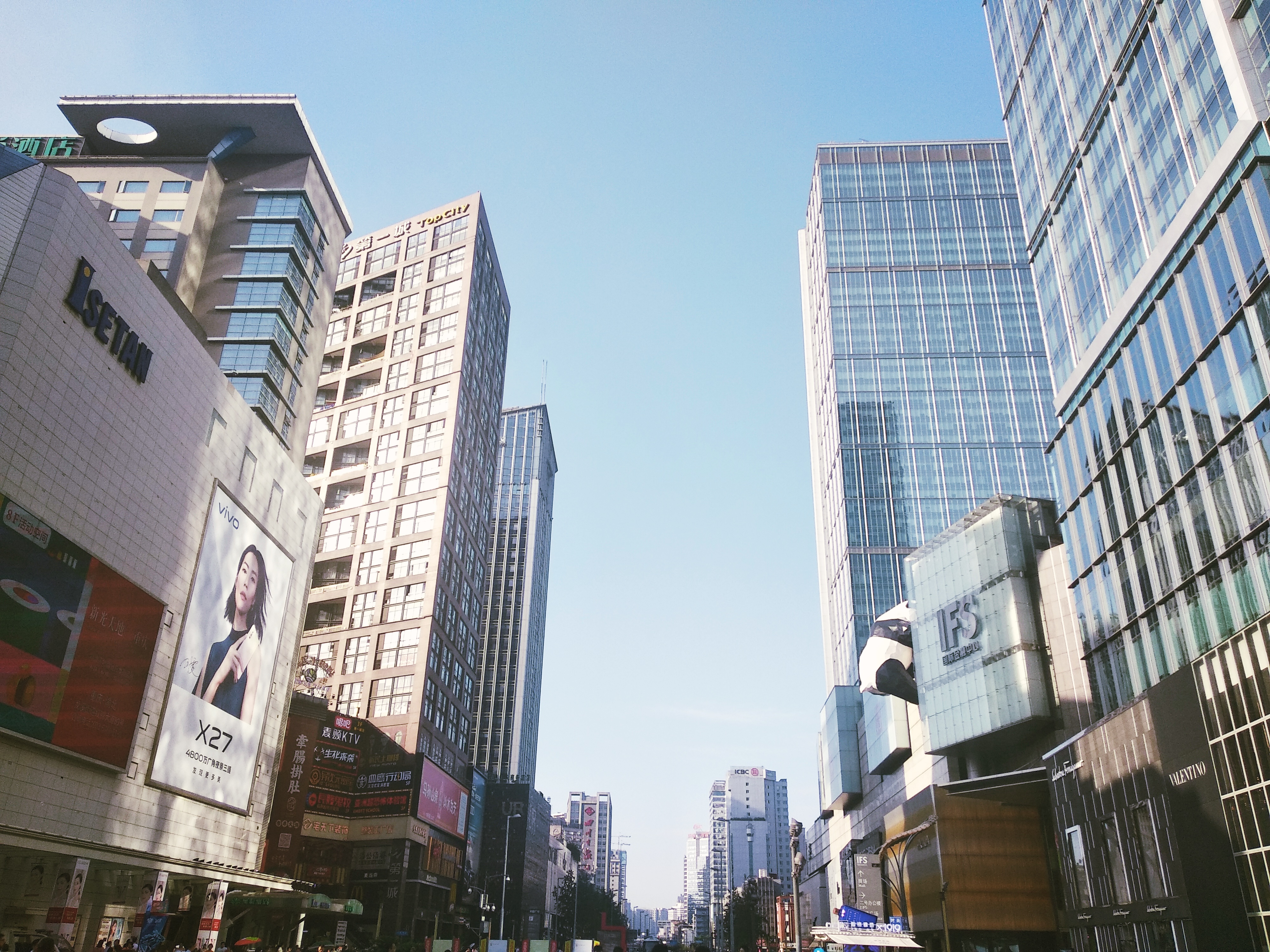 春熙路街景，摄于2019年6月